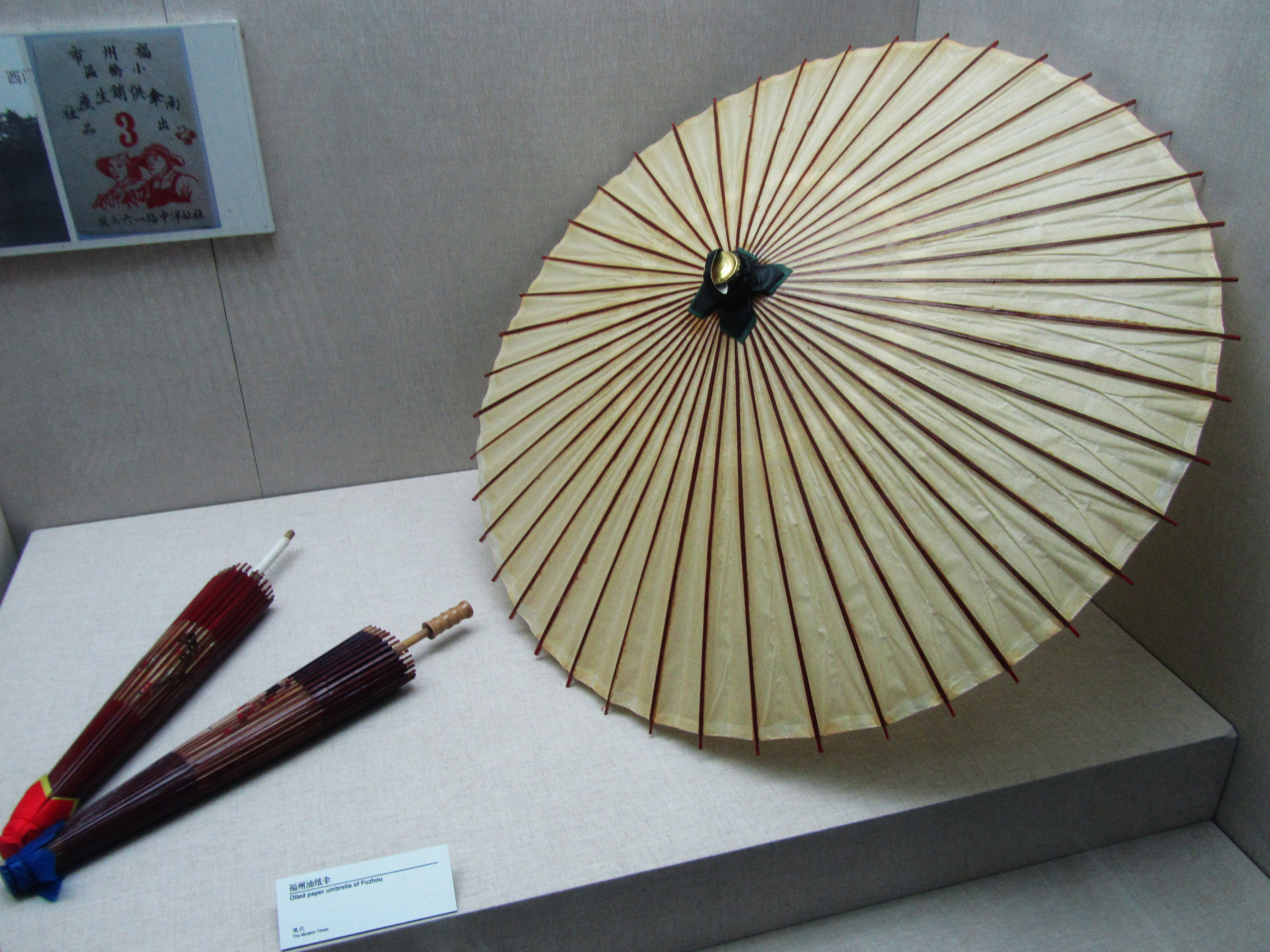 福州油纸伞，现藏中国伞博物馆。